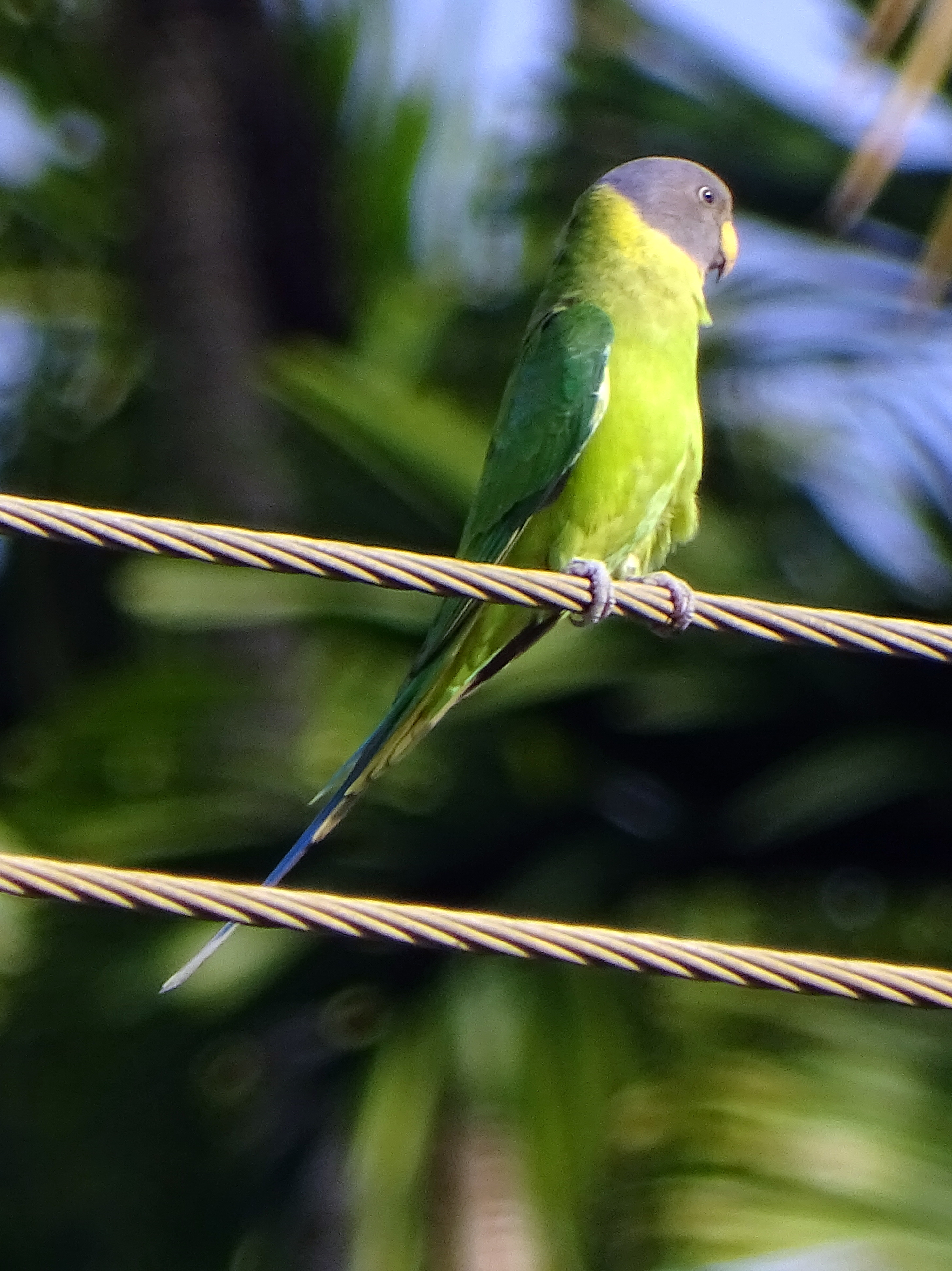 പൂന്തത്ത, പെൺപൂന്തത്തം തത്ത